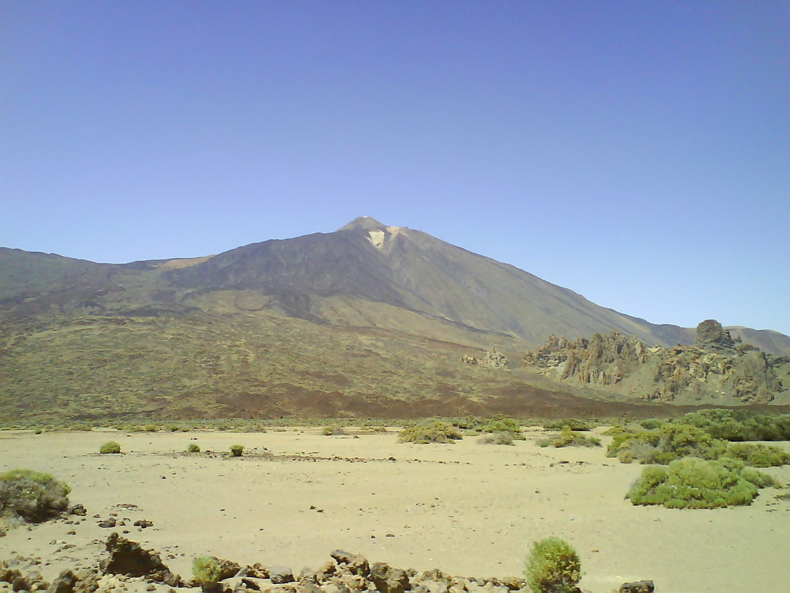 El Teide desde LLano Ucanca.